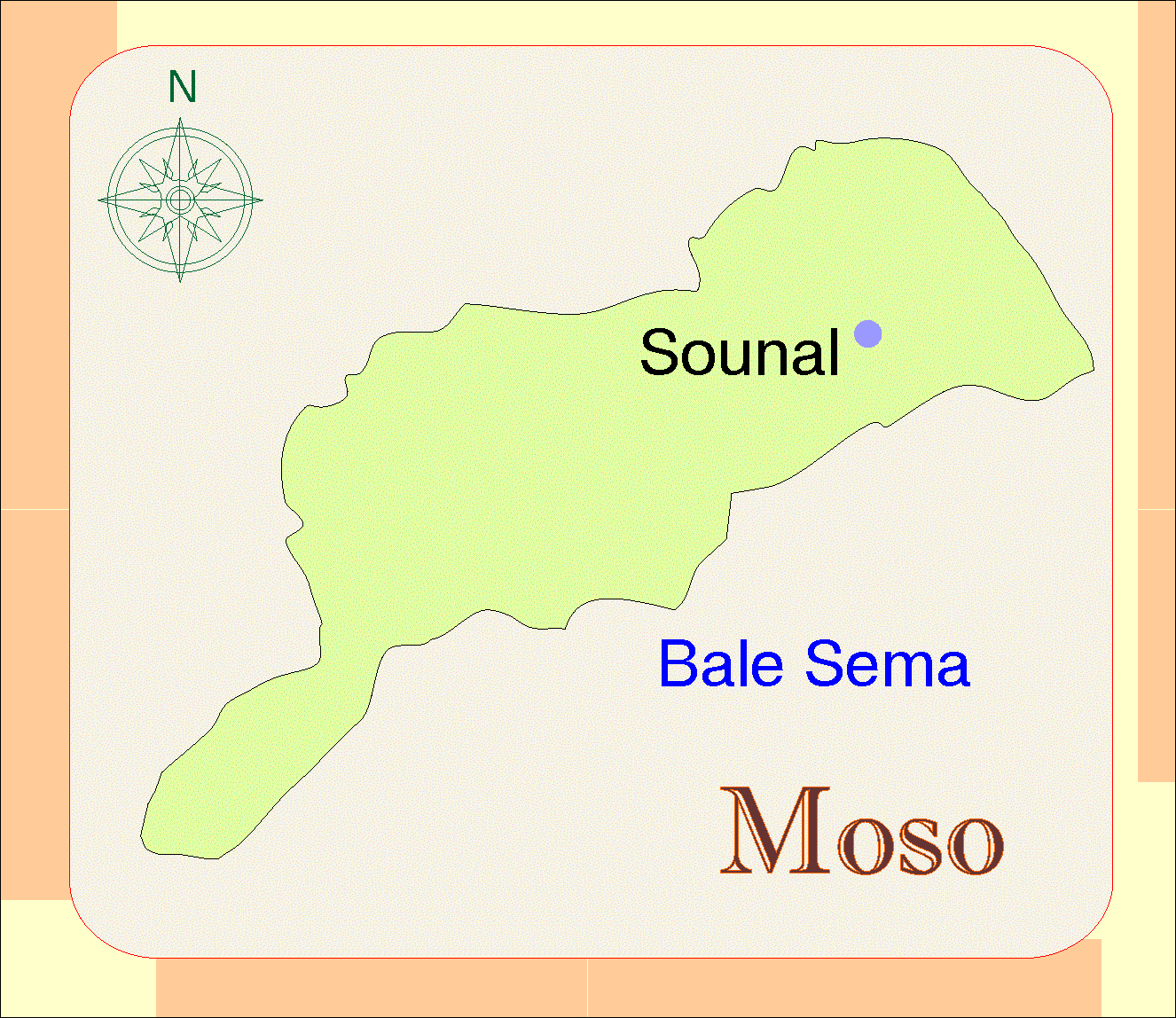 Автор: Галина Йорданова Summary Карта на остров Мосо.